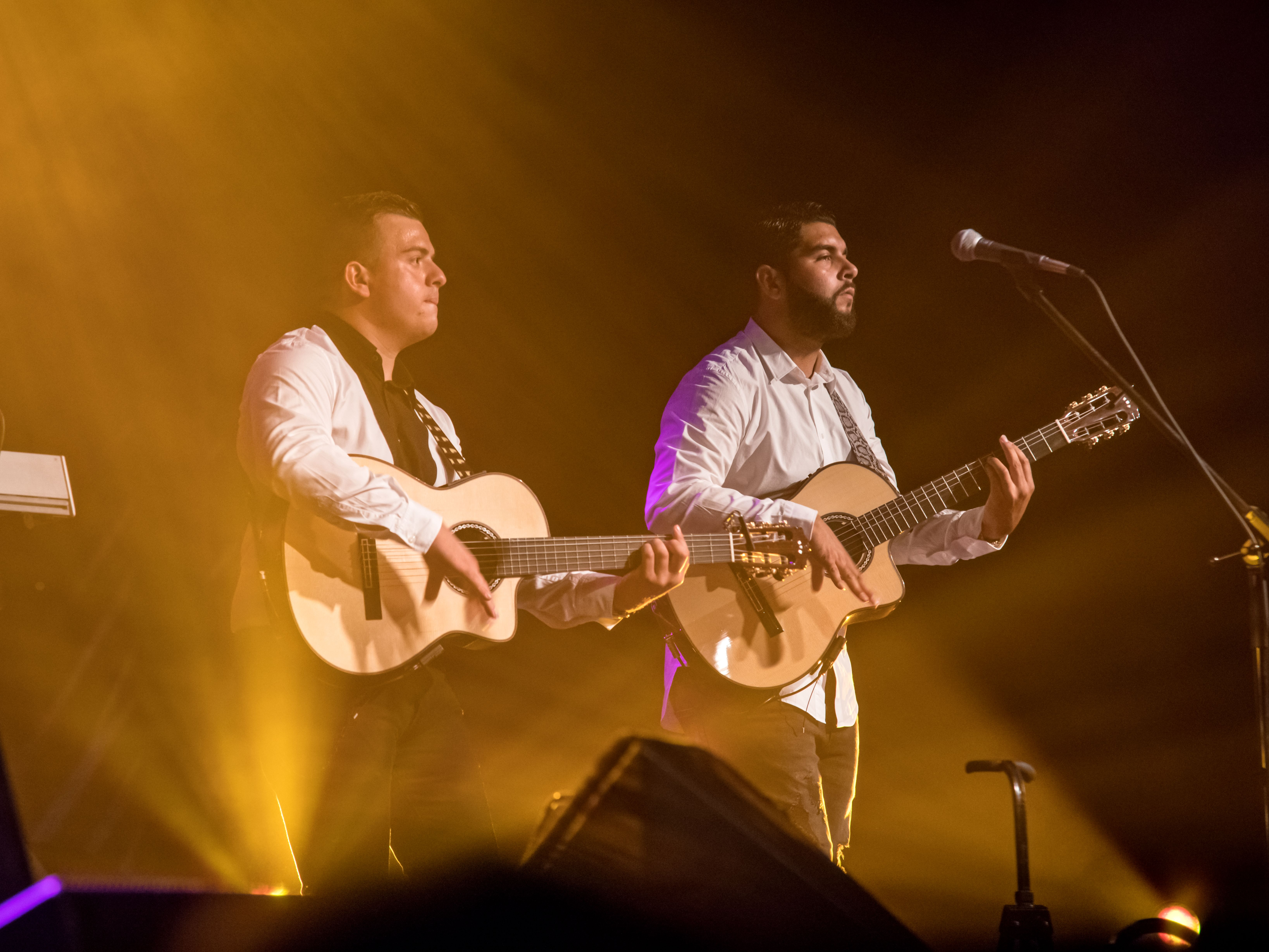 Bilder vom Zelt Musik Festival 2016 in Freiburg im Breisgau Gipsy Kings